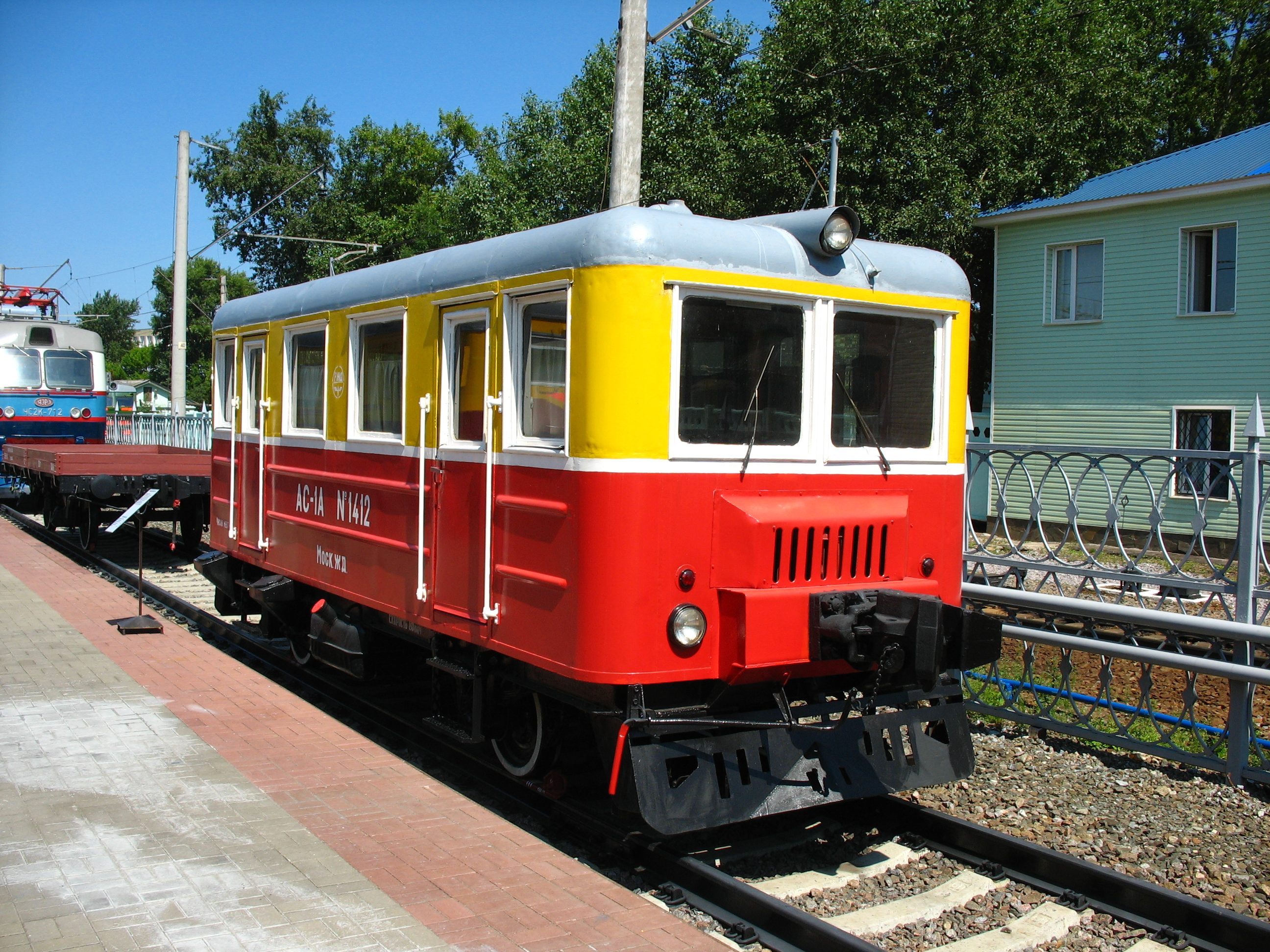 Автомотриса АС1А-1412 построена в 1972 г. на Великолукском локомотиво-ремонтном заводе. Работала и реставрирована в 2004 г. в Калужской дистанции электроснабжения. Находится в в Музее истории развития железнодорожного транспорта Московской железной дороги РЖД.